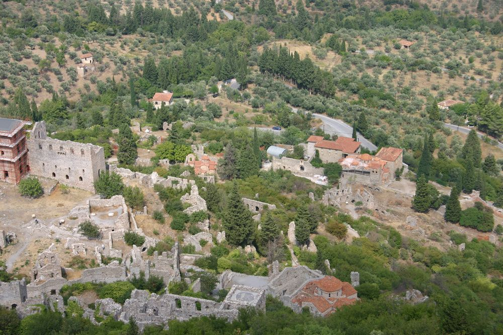 Mystras (Grèce) : vue du site du château franc